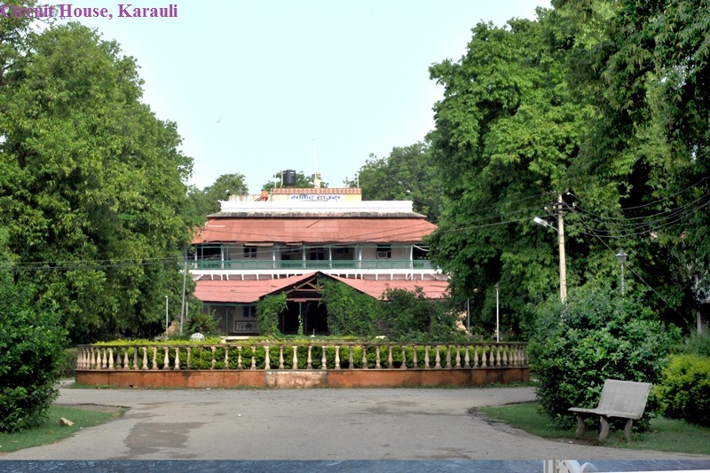 सर्किट हाउस हरसुखविलास